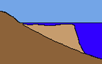 schematische Darstellung eines Küsten- oder Inselsaumriffs